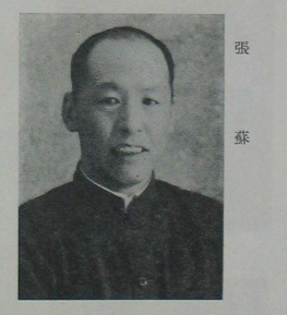 中文（台灣）: 中國人民政治協商會議第一屆全體會議代表